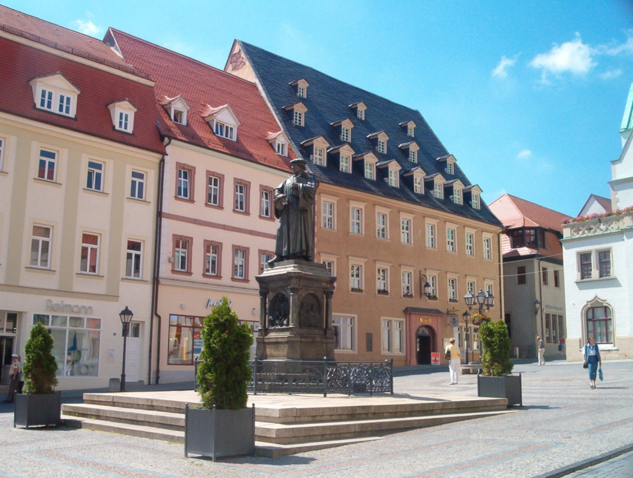 Lutherstadt Eisleben - Lutherdenkmal